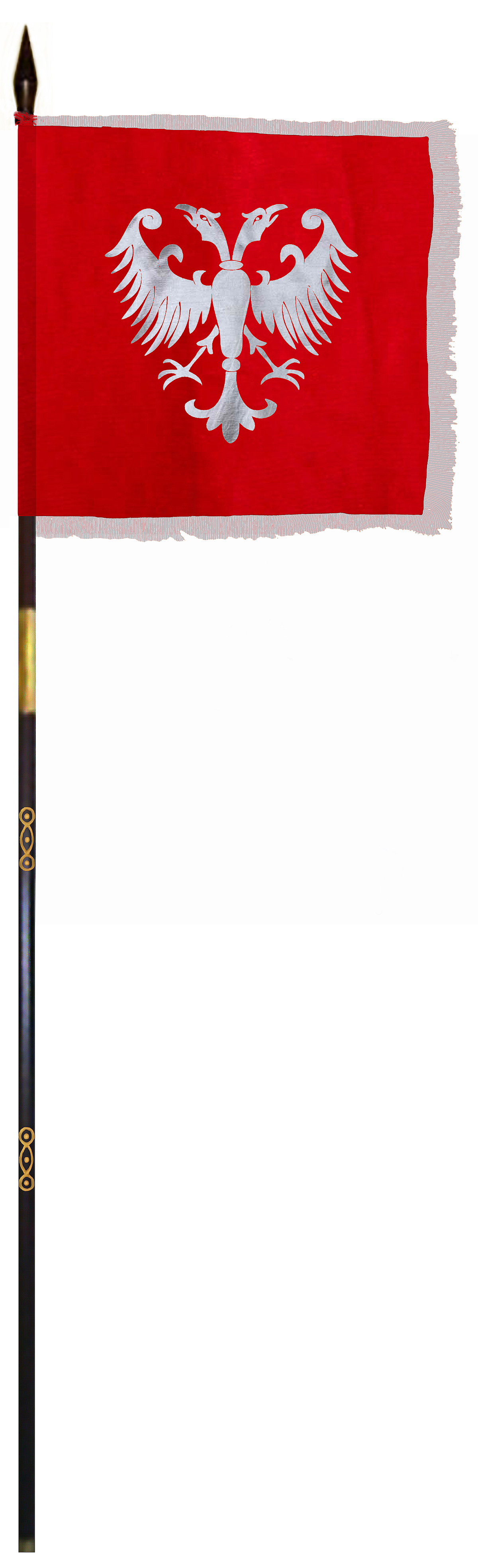 Опис слике: Царска династичка застава Немањића